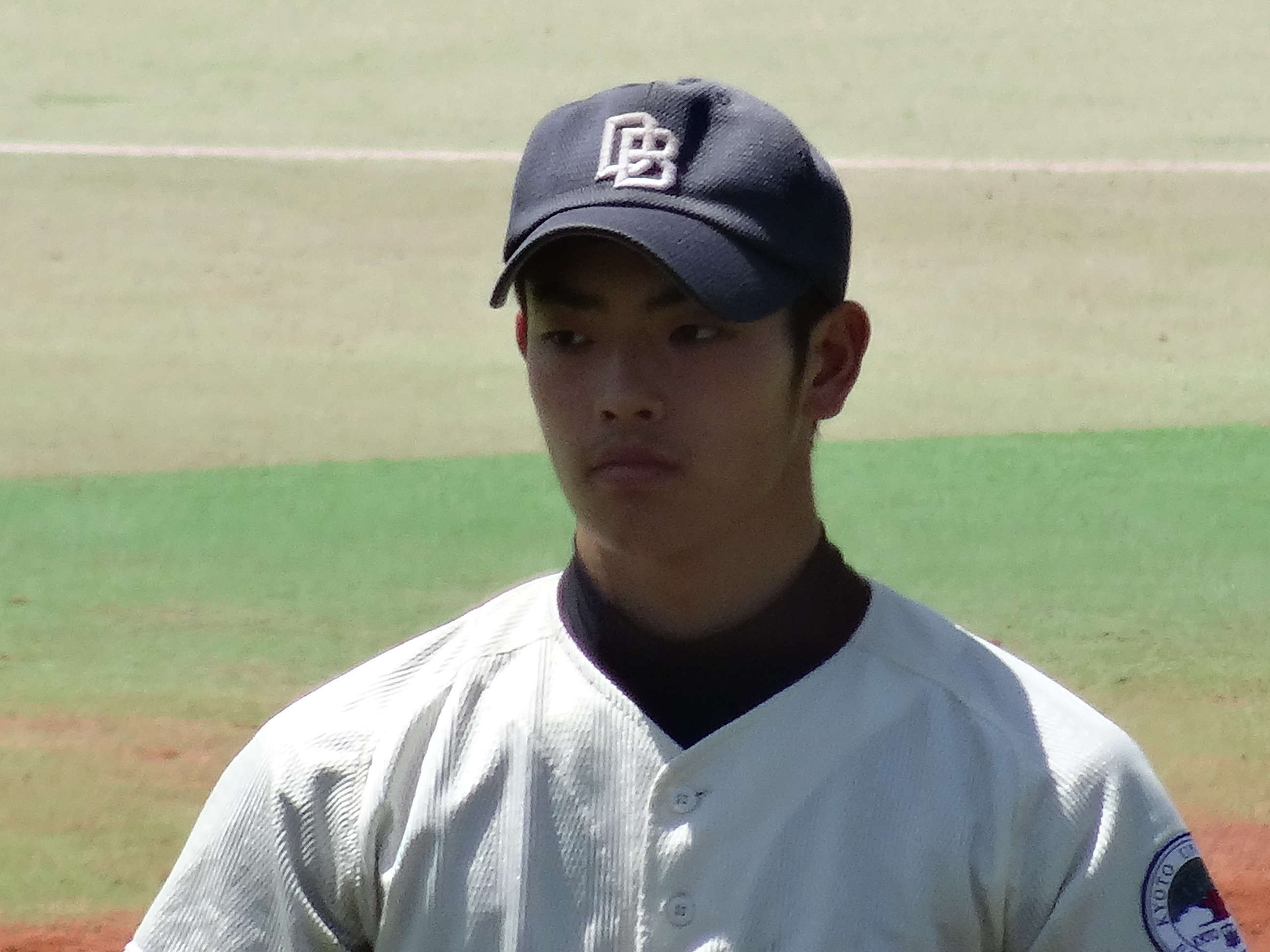 千葉ロッテマリーンズ所属の田中英祐投手です（京大時代）。